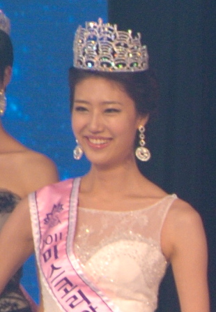 2011 미스코리아 당선자들